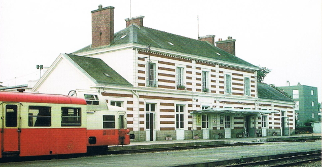 Gare de Pontivy dans les années 70/80.